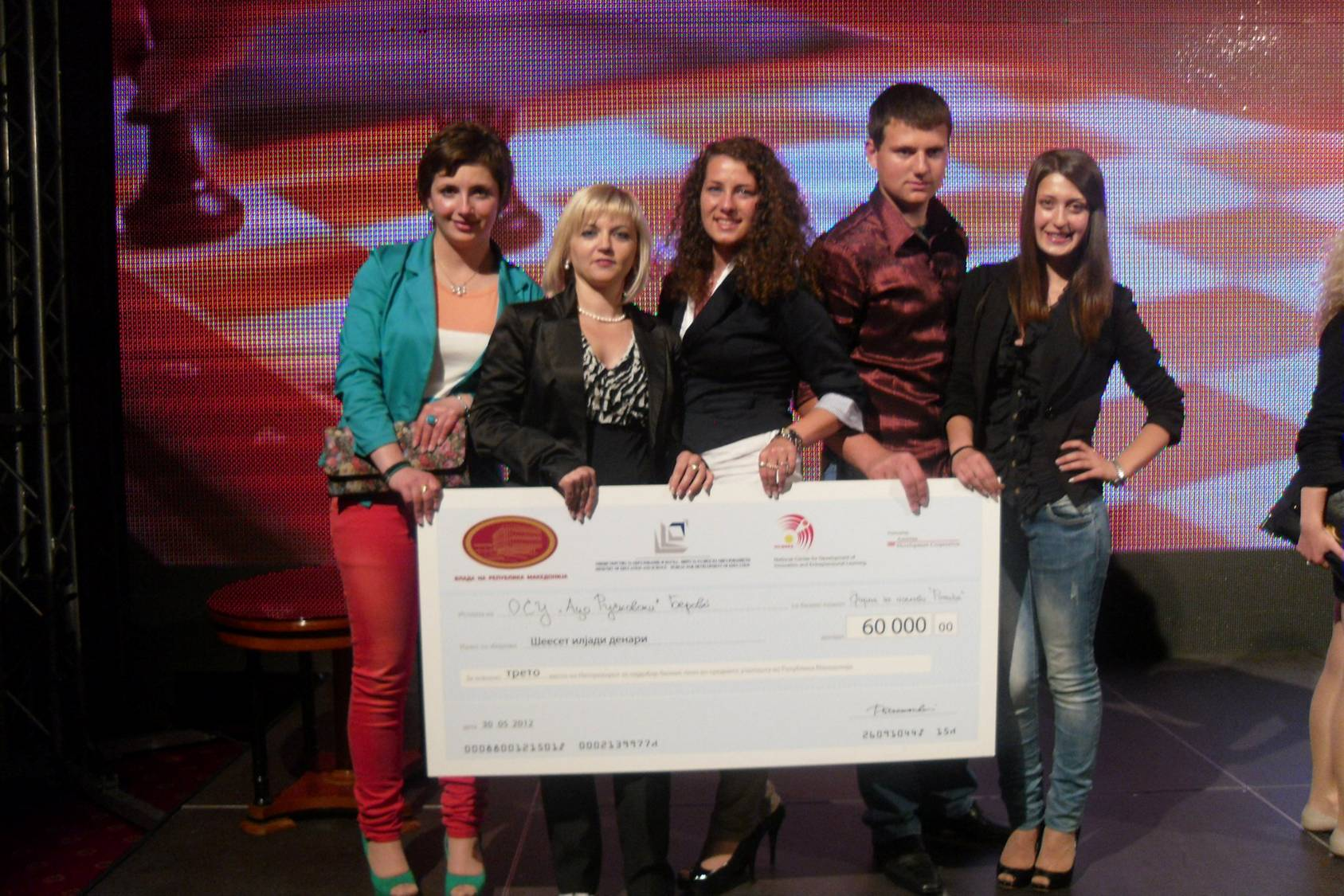 Натпревар за најдобар бизнис план